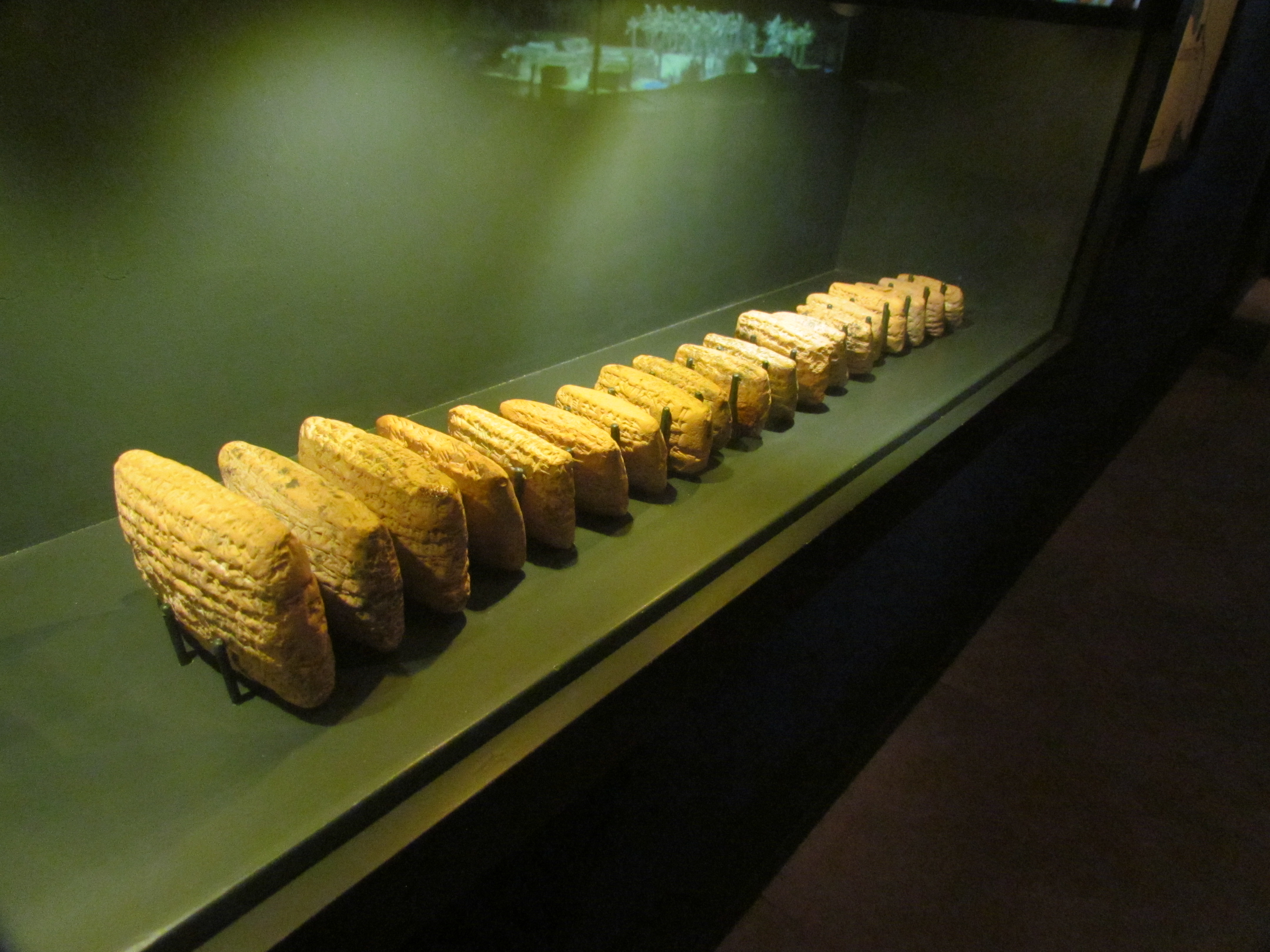 מתעודות אל יהודו: לוחות טין מוטבעים בכתב יתדות. מוזיאון ארצות המקרא, ירושלים.